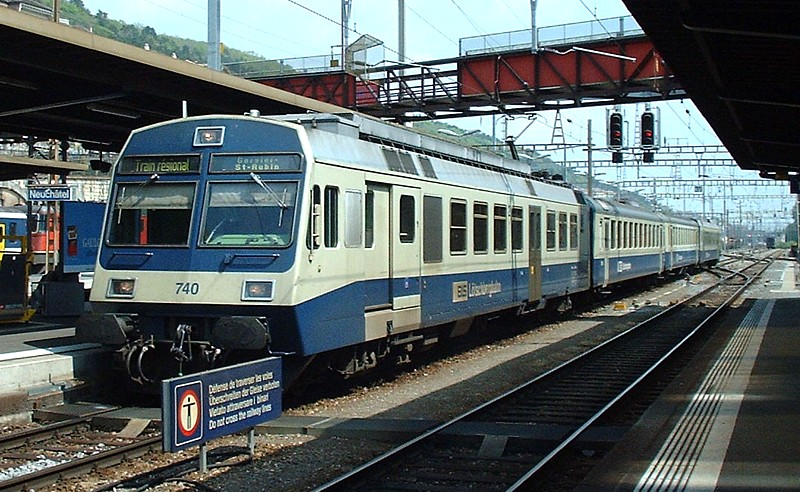 Train régional BLS en gare de Neuchâtel